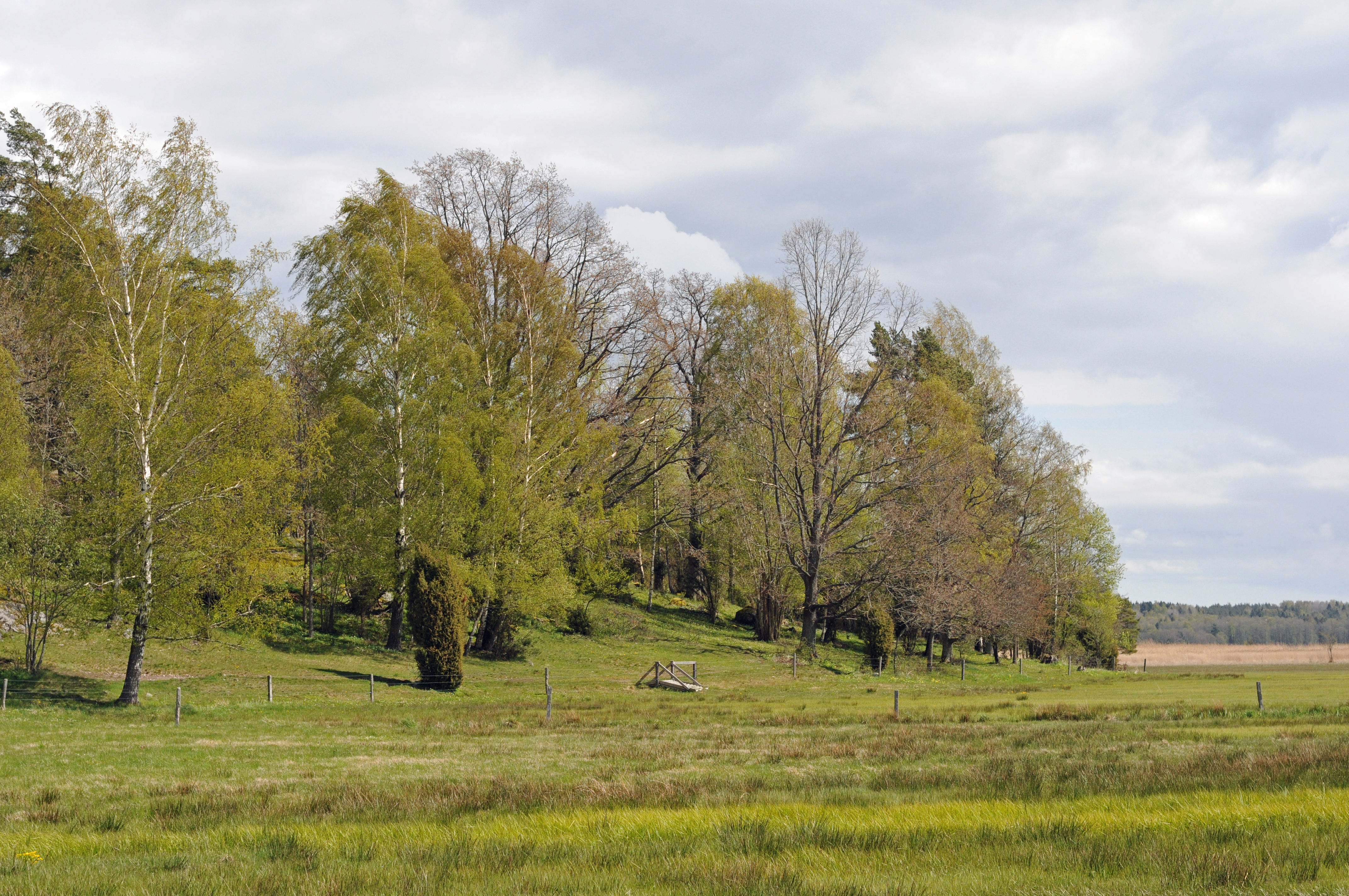 Labro ängar naturreservat, Nyköpings kommun